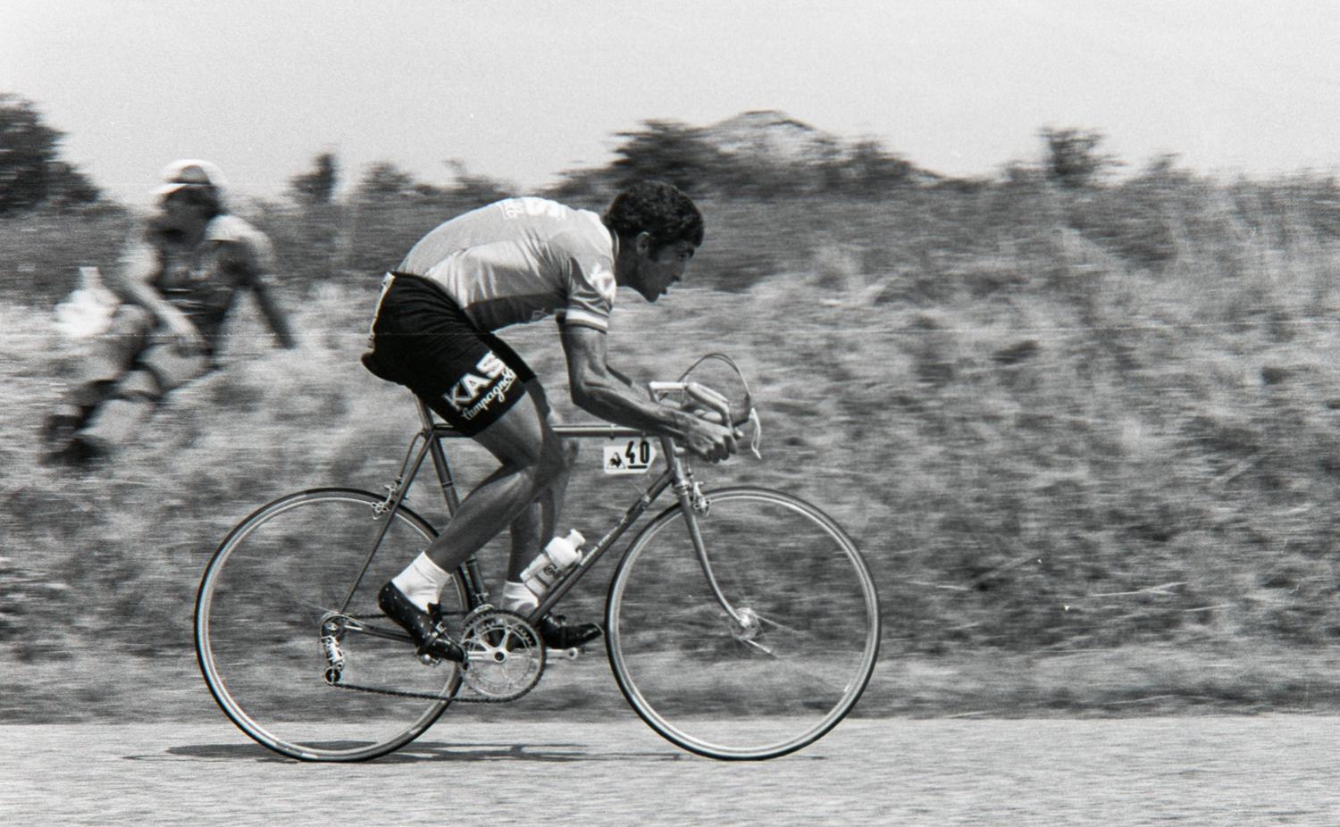 José Pesarrodona durant le Tour de France 1976. Photographie : René Milanese